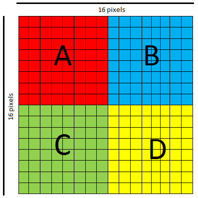 Imatge de Macroblocs